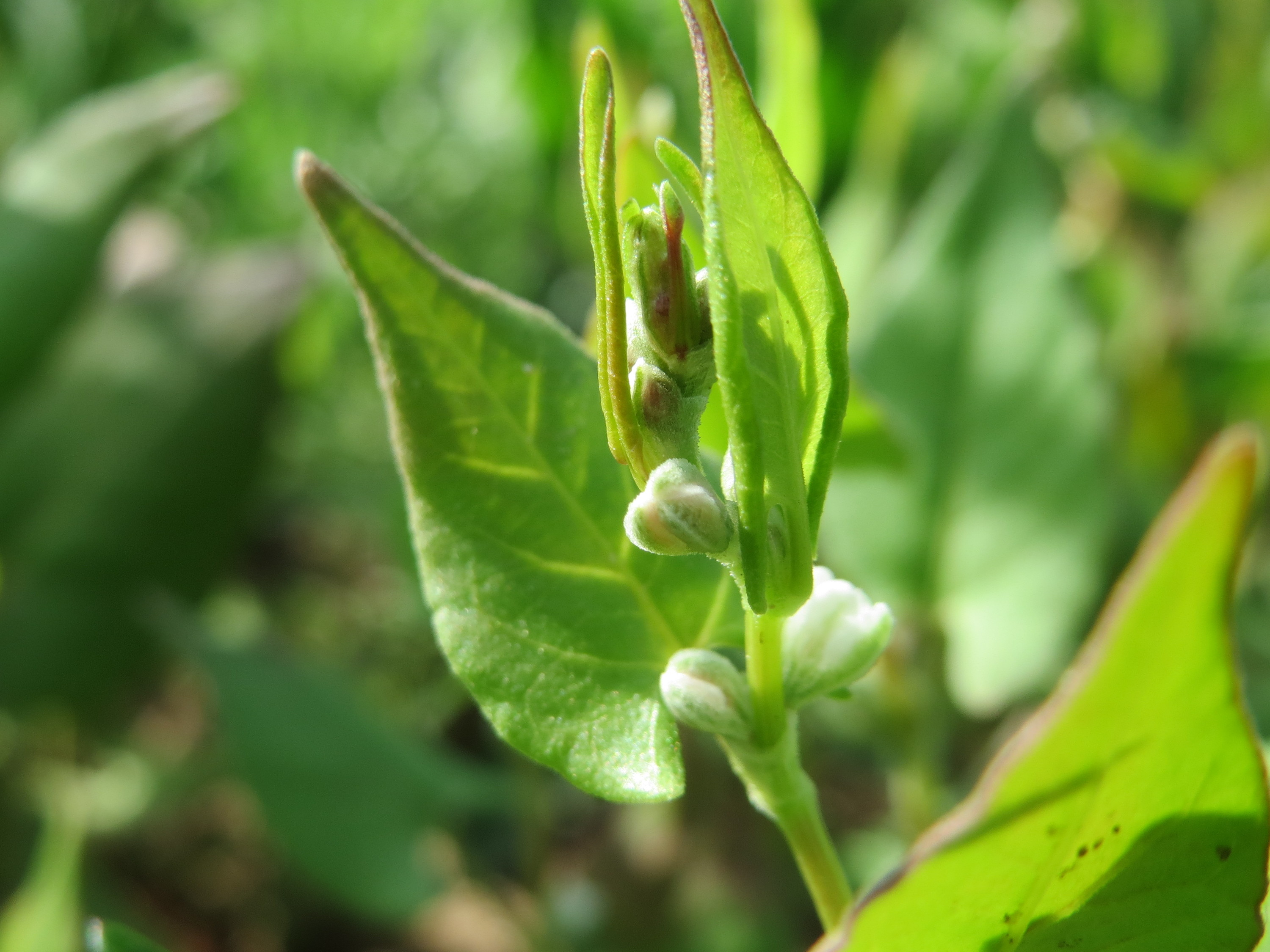 Echter Buchweizen (Fagopyrum esculentum) auf einer Ackerbrache bei Hockenheim